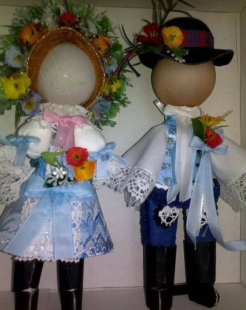 kroje